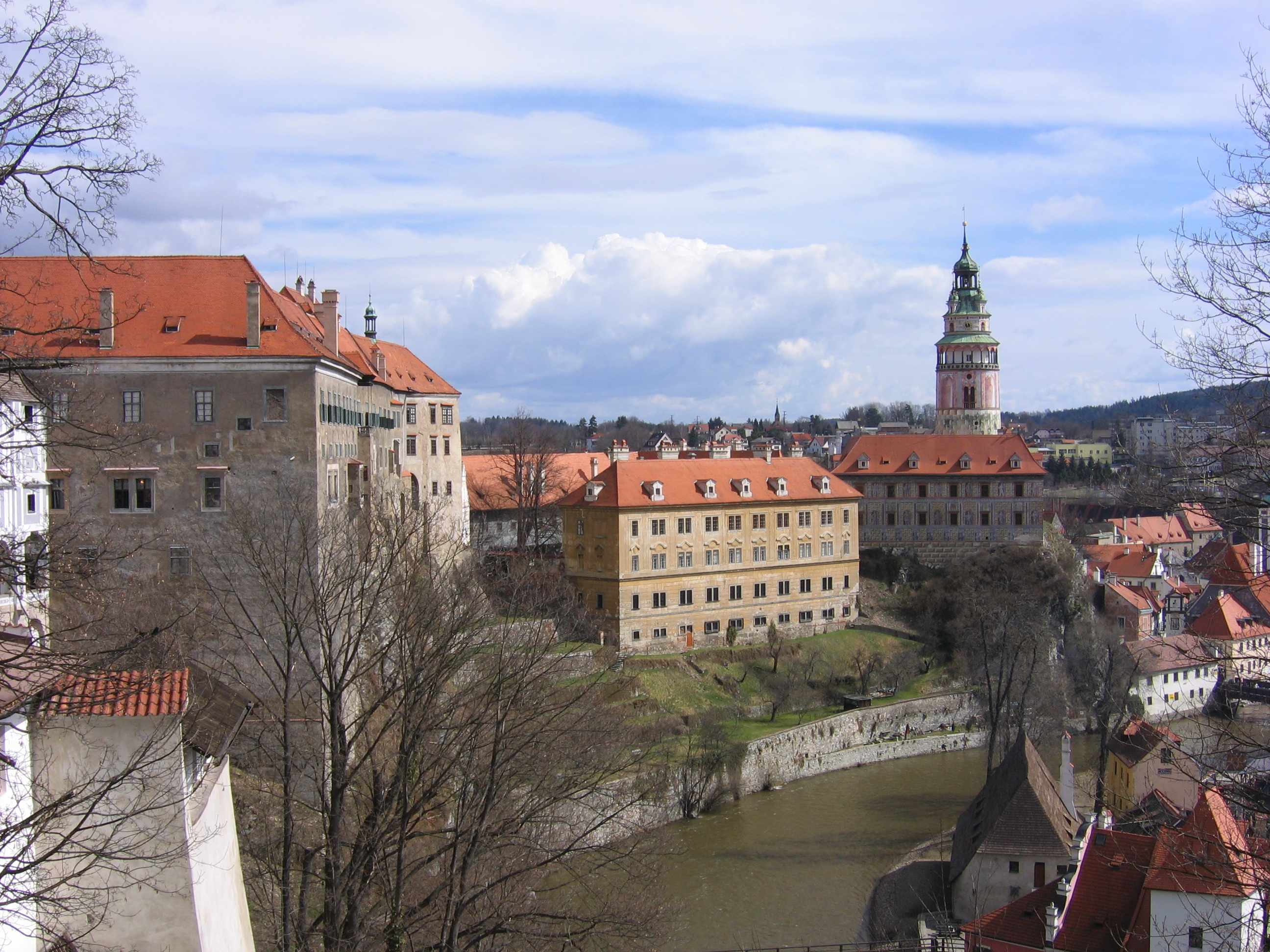 Cesky Krumlov, Czech Republic